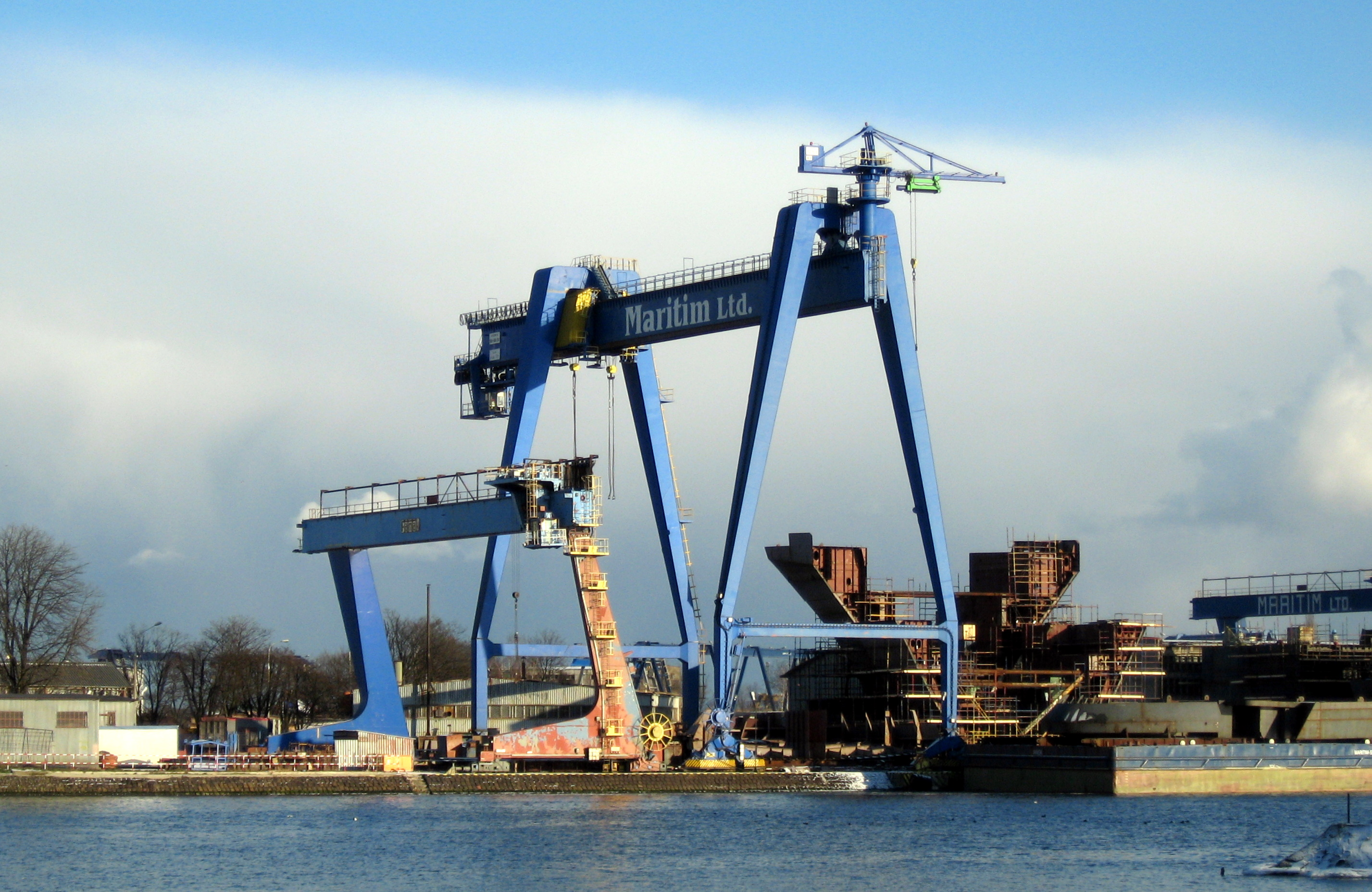 Suwnica stoczni "Maritim Ltd." w gdańskiej dzielnicy Stogi z Przeróbką.